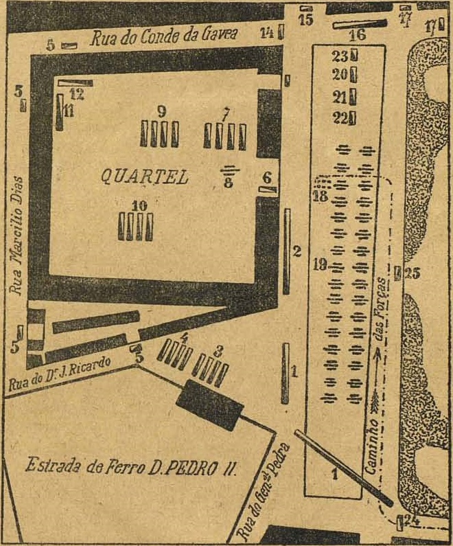 A Revolução de 15 de Novembro, carta do tenente-coronel Jacques Ourique ao Jornal do Commercio, representando a posição das tropas no dia 15 de novembro de 1889, organisada pelo tenente-coronel de engenheiros A. E. Jacques Ourique e desenhada por J. M. P. de Lima Junior, desenhista da I. de Obras Públicas.